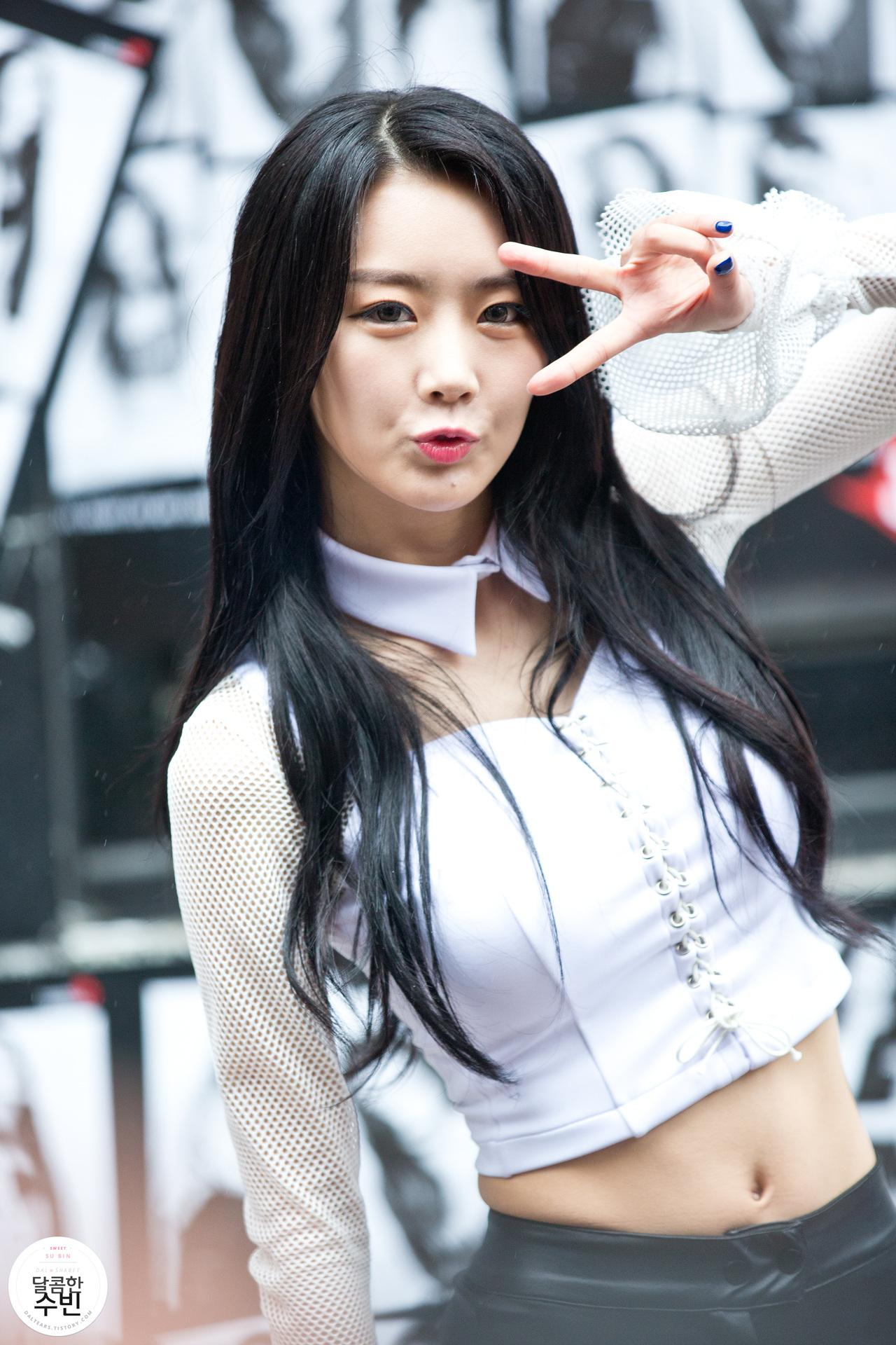 [15.05.03] 명동 게릴라 직찍 ( 달샤벳 수빈 )